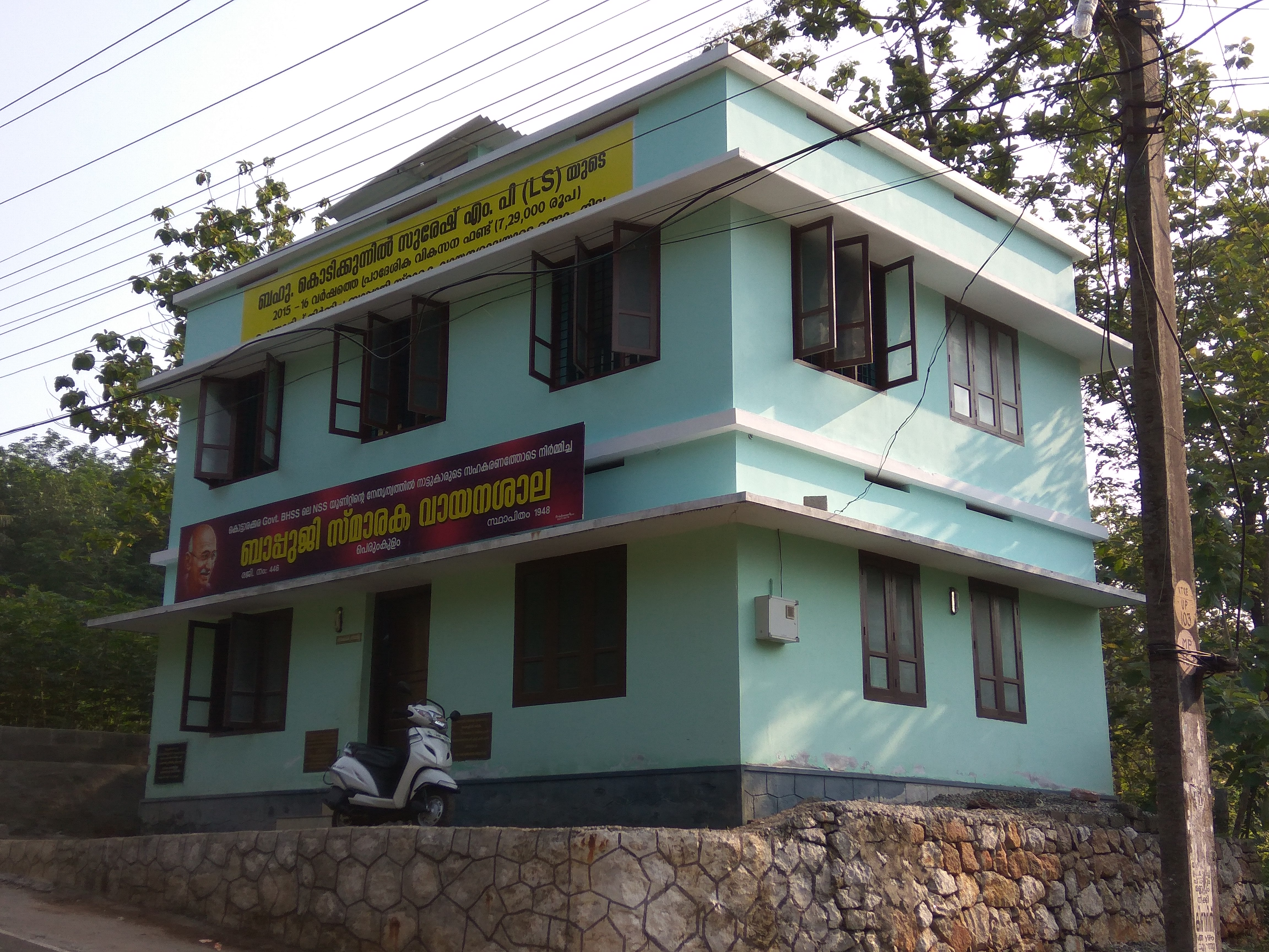 ബാപ്പുജി സ്മാരക വായനശാല, പെരുംകുളം